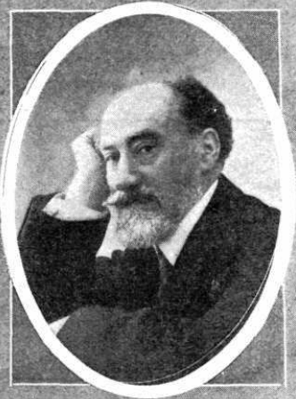 Fotografía del historiador español y cronista de Madrid Carlos Cambronero publicada en 1912 con ocasión de que el Ayuntamiento de Madrid solicitara un puesto para él en la Real Academia de la Historia